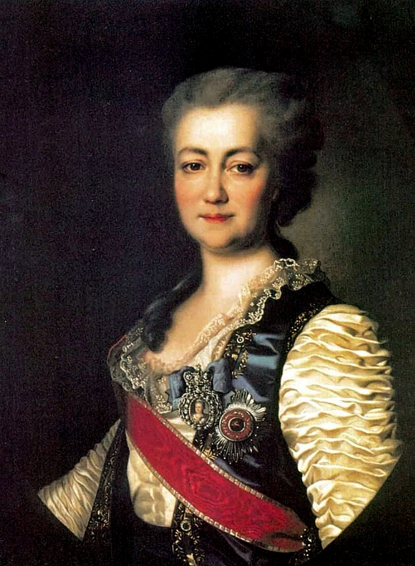 Авторское повторение портрета из собрания Музея Хиллвуд